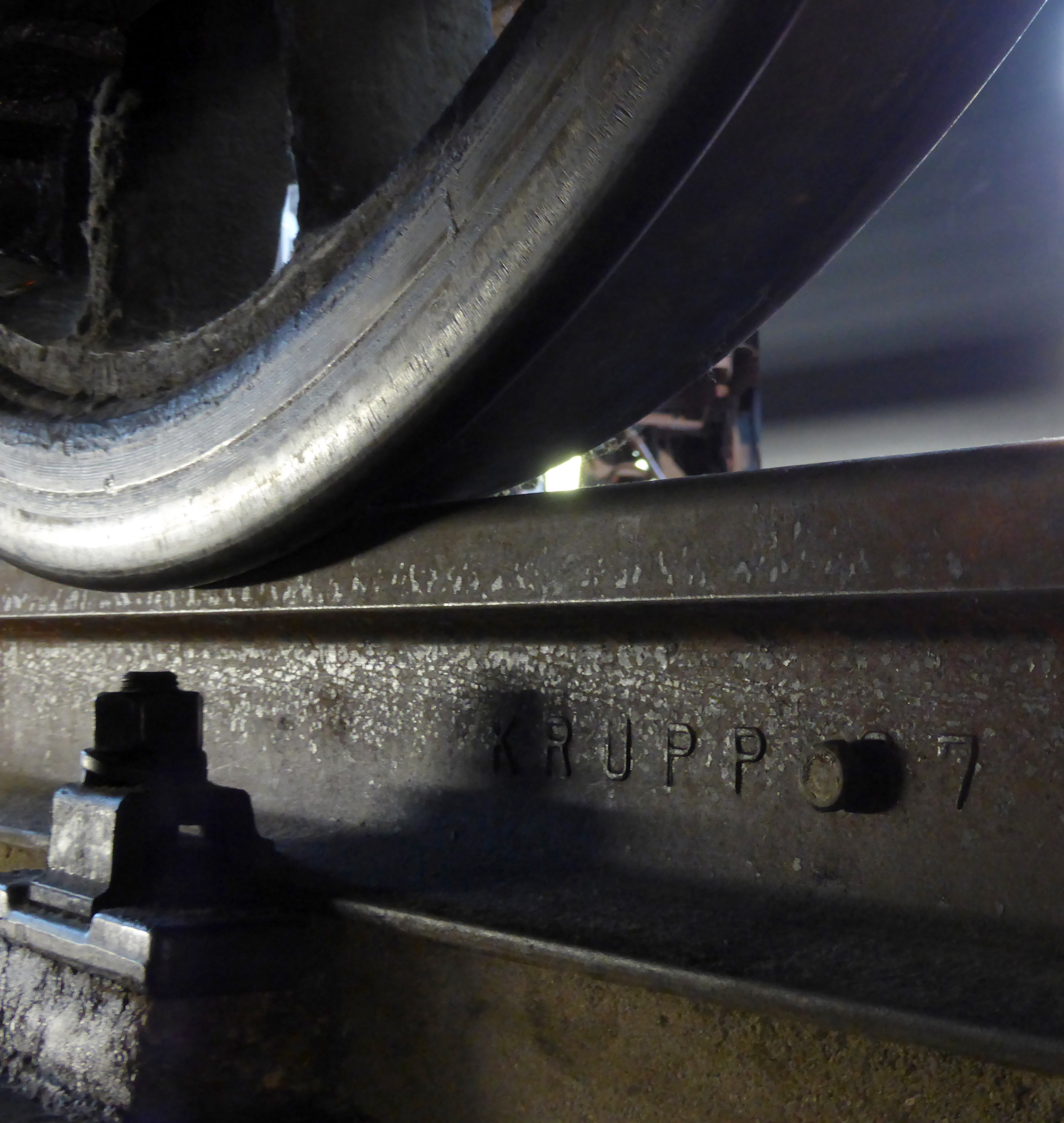 Eisenbahnrad und Schiene Friedrich Krupp AG im Deutschen Technikmuseum in Berlin. Wikipedianische KulTour am 10. Oktober 2015 in der Ausstellung des Museums.